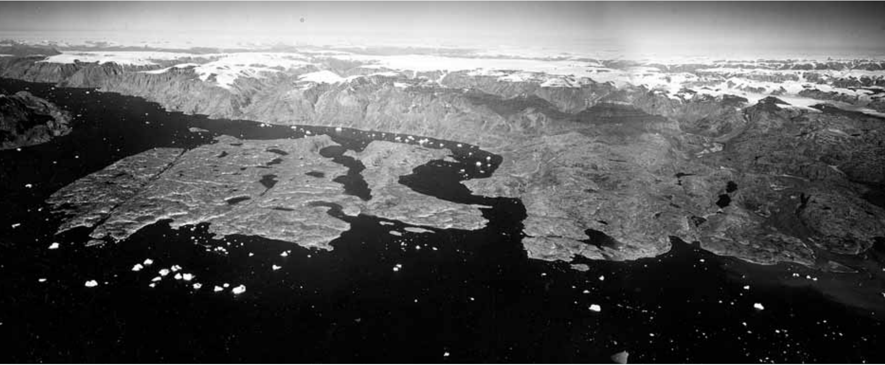 Skråfoto fra Grønland, set mod VNV. Geodætisk Institut rute 650, billede nr. 2973 og 2975. Milne Land med Danmarks Ø i forgrunden